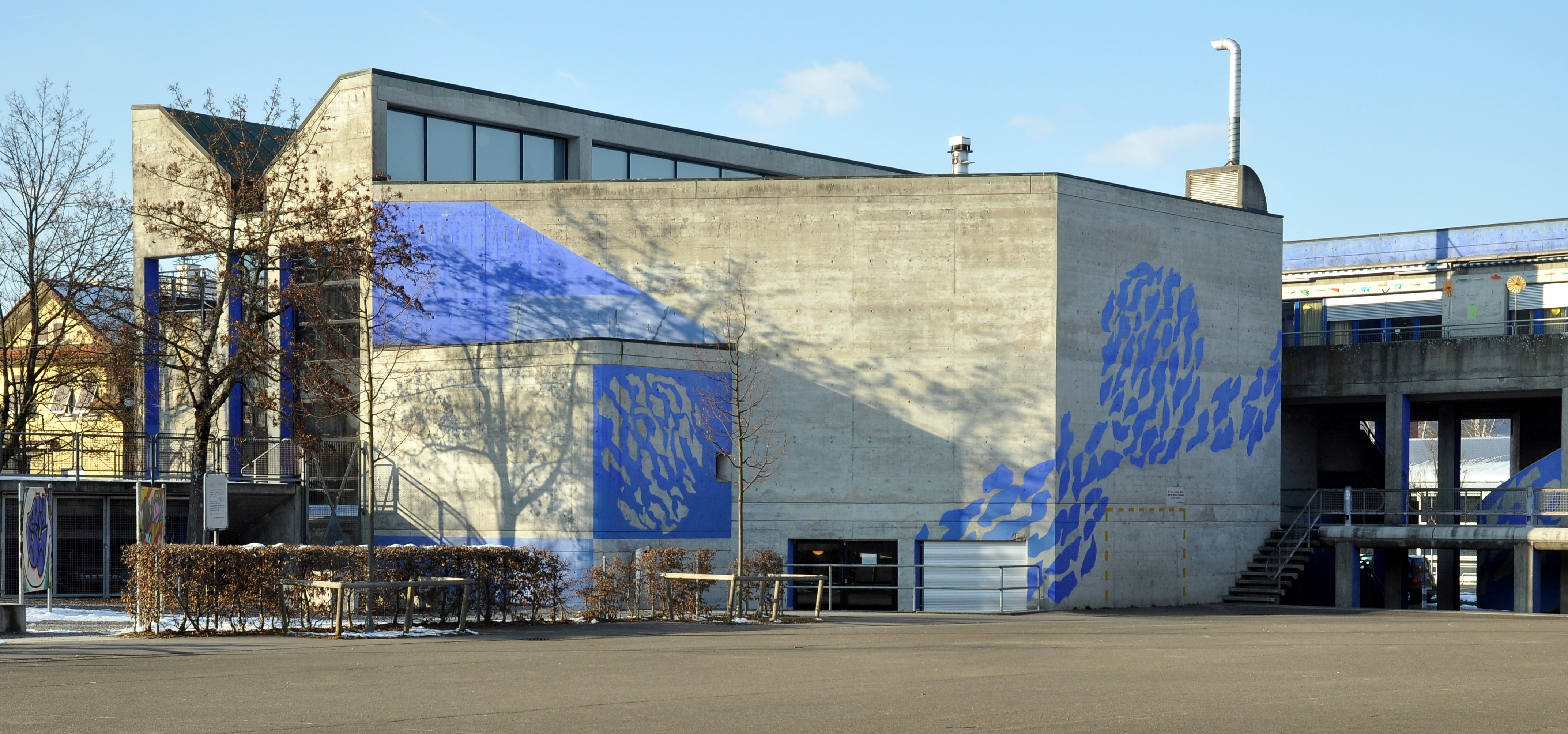 Loogarten, Primarschule und Freizeitanlage, Zürich, 1974-75, Architekt: Naef, Studer und Studer, Fassadenbemalung